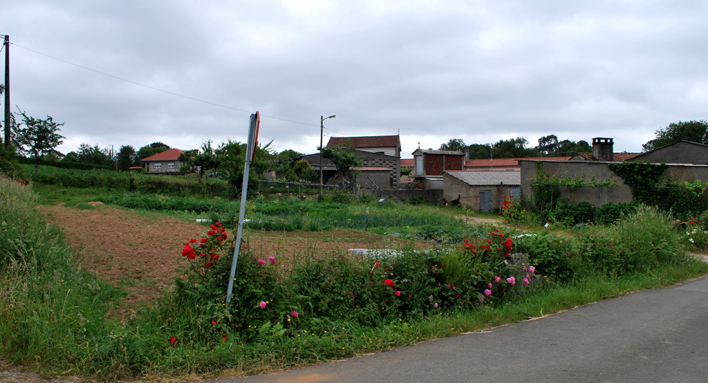 Vista da Grela parroquia de Parada en Ordes, A Coruña